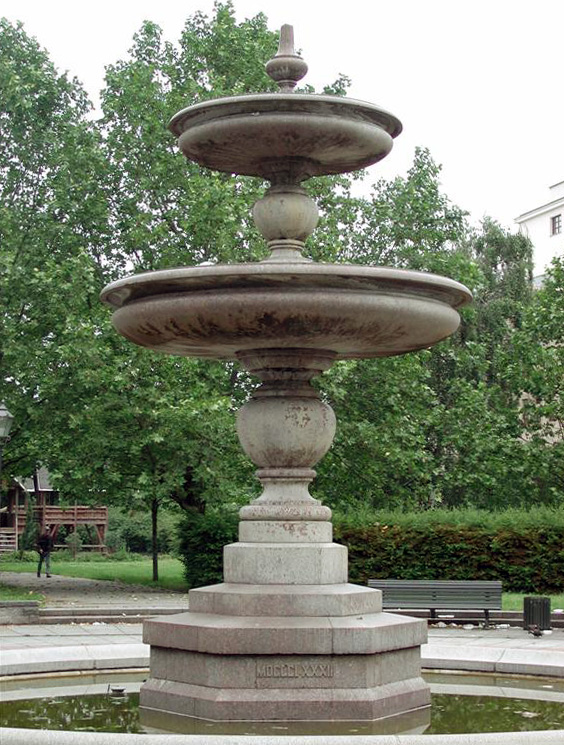 Der Spindlerbrunnen auf dem Spittelmarkt im Jahr 2005